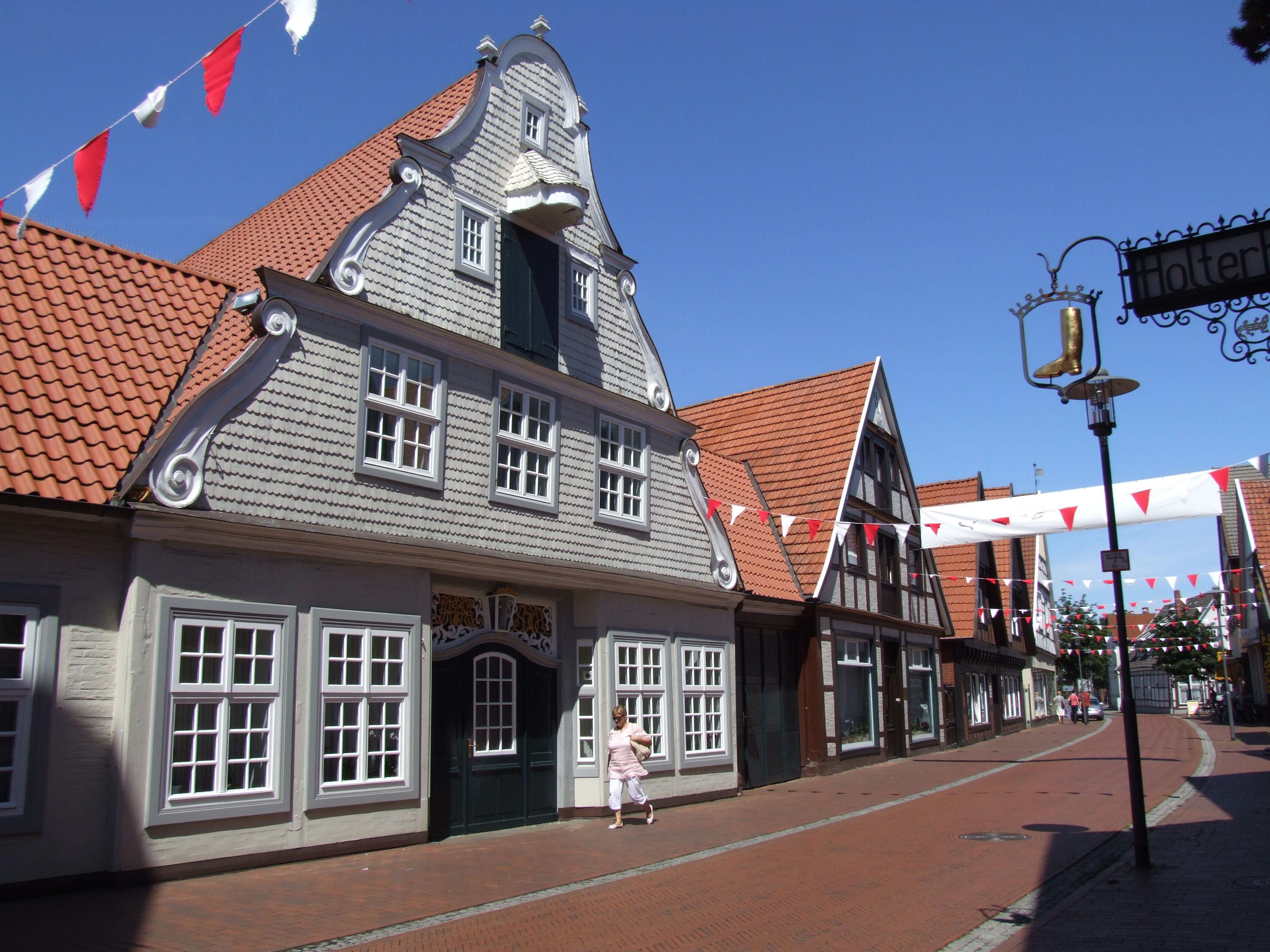 Quakenbrück, Lange Straße, Stammhaus der Familie Heye